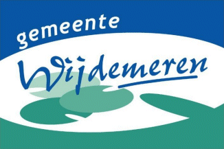 Vlag gemeente Wijdemeren